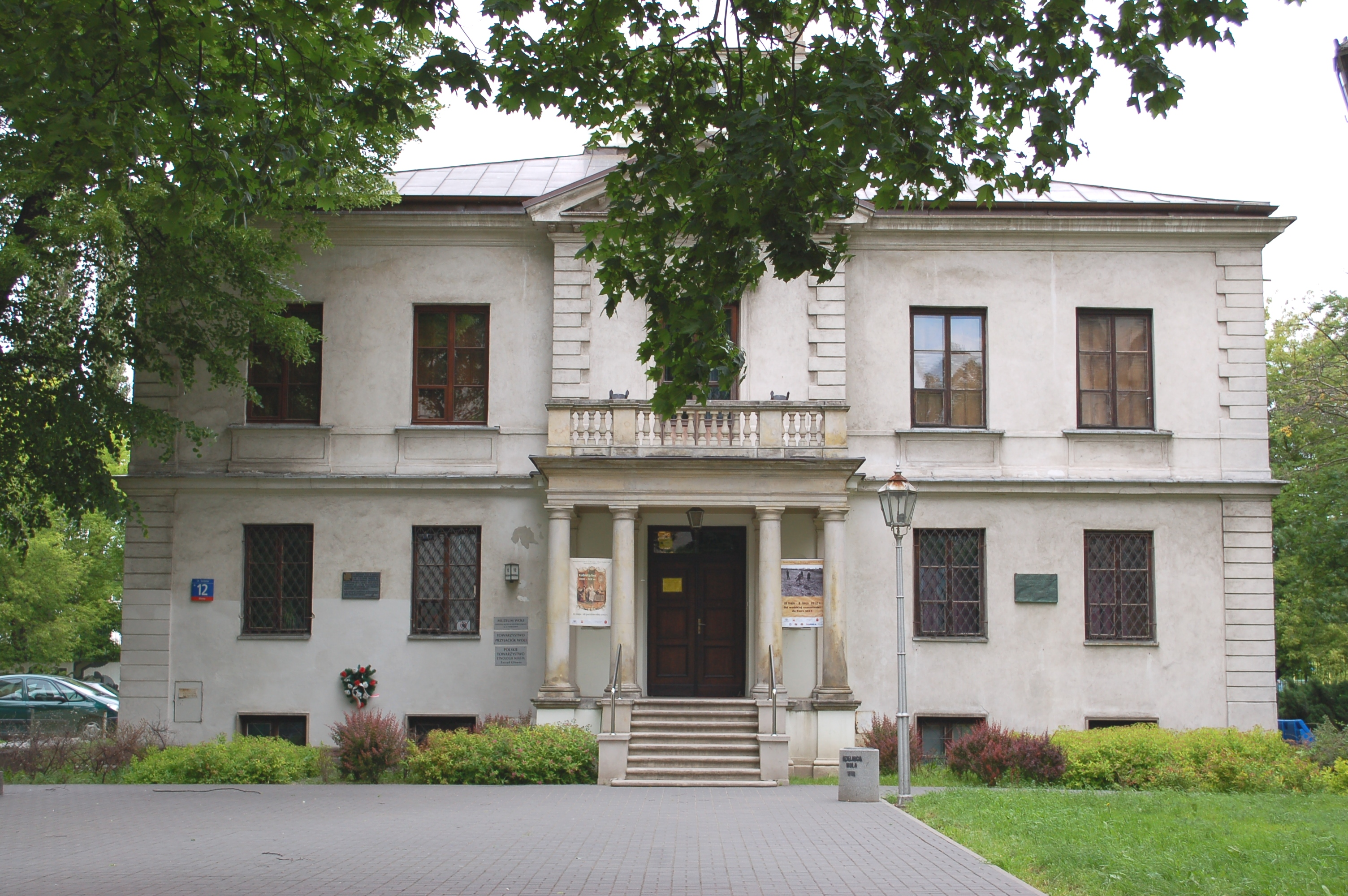 Museum Wola, Warschau